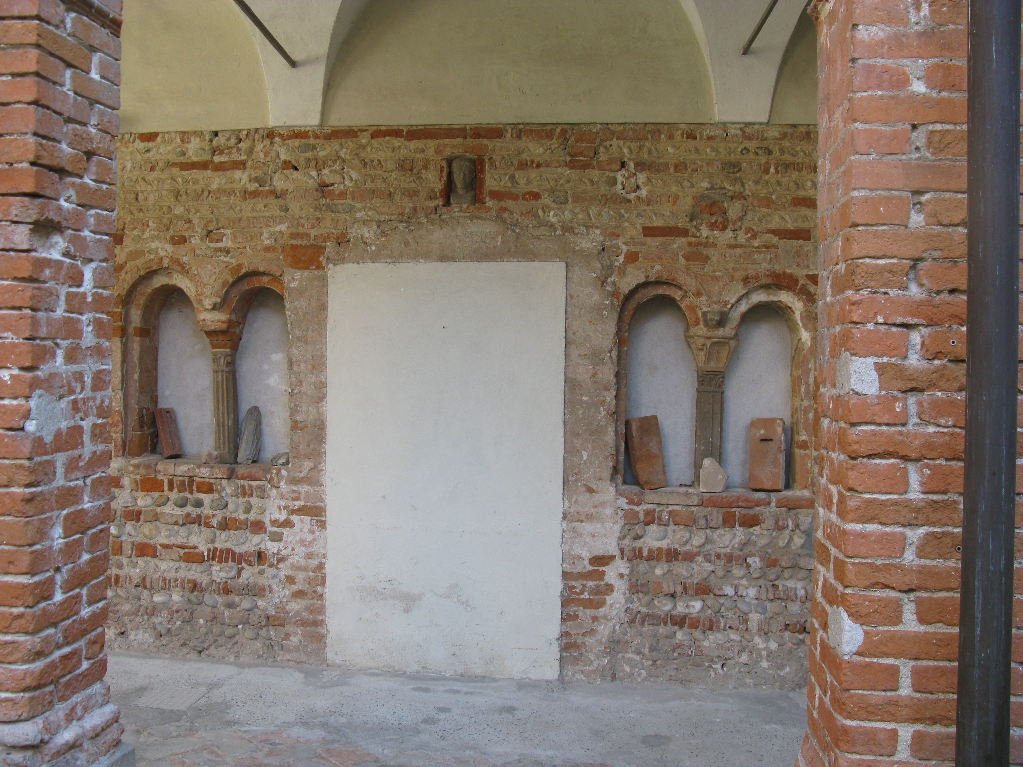 Pavia, San Pietro in Verzolo, chiostro